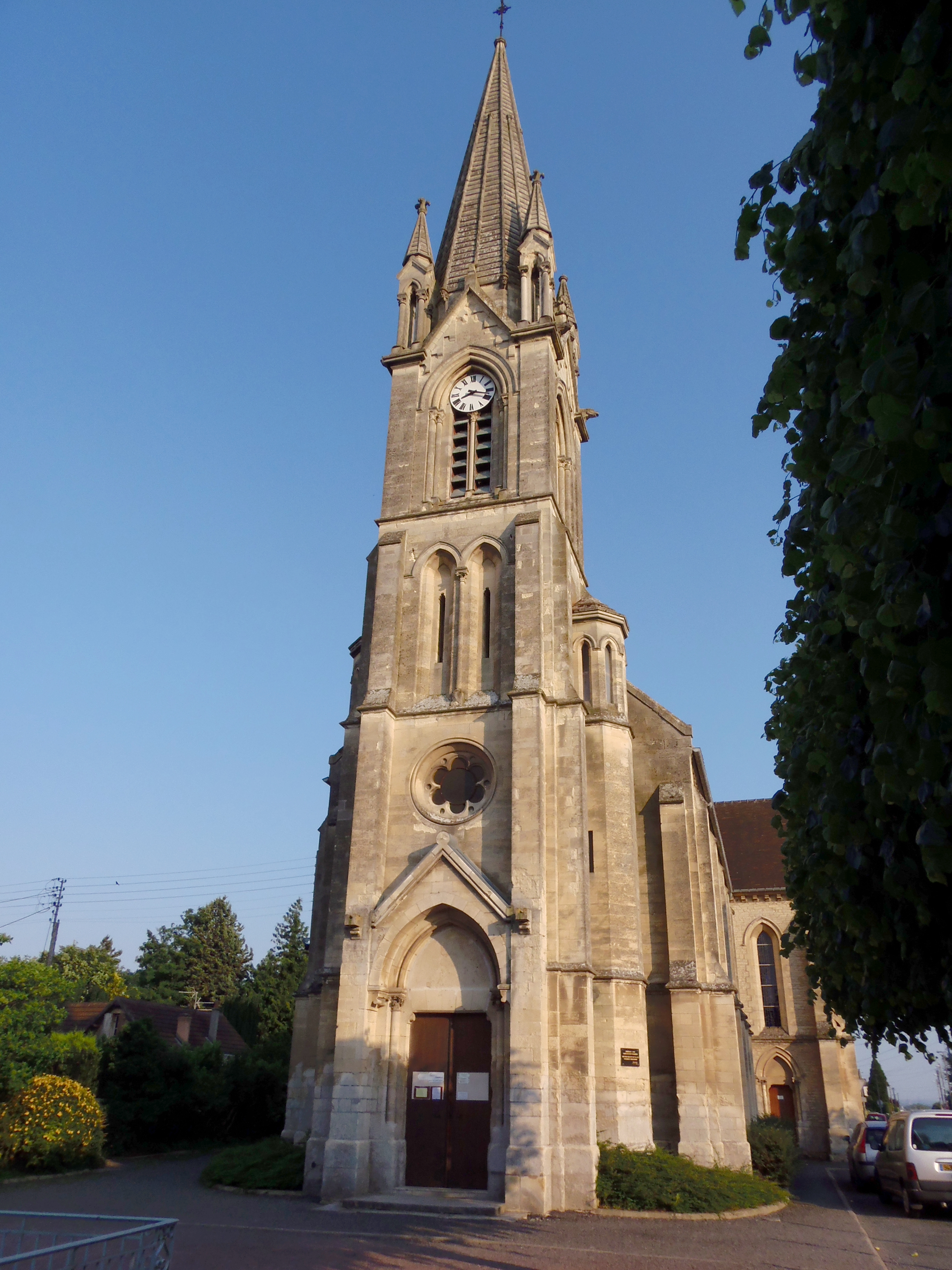 Caen (Normandie, France). L'église Saint-Gerbold de Venoix.